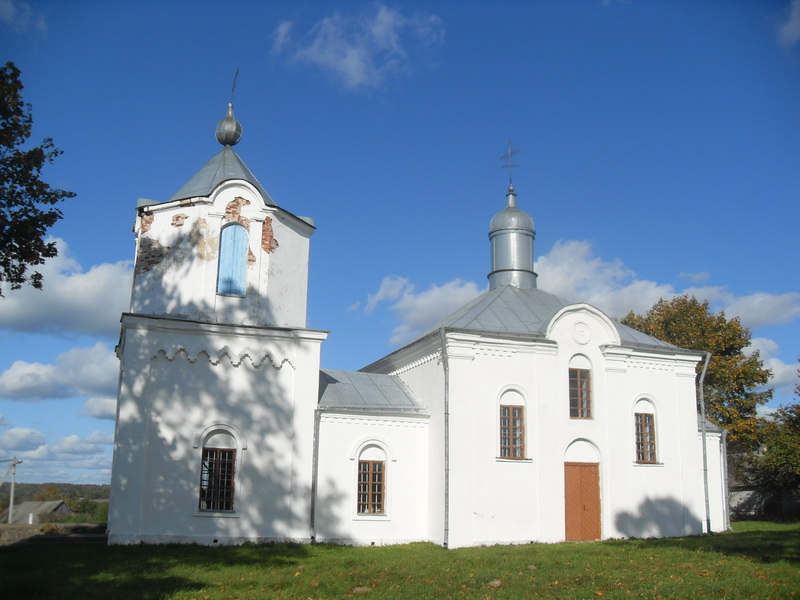 Міхайлоўшчына. Царква Святога Ільі